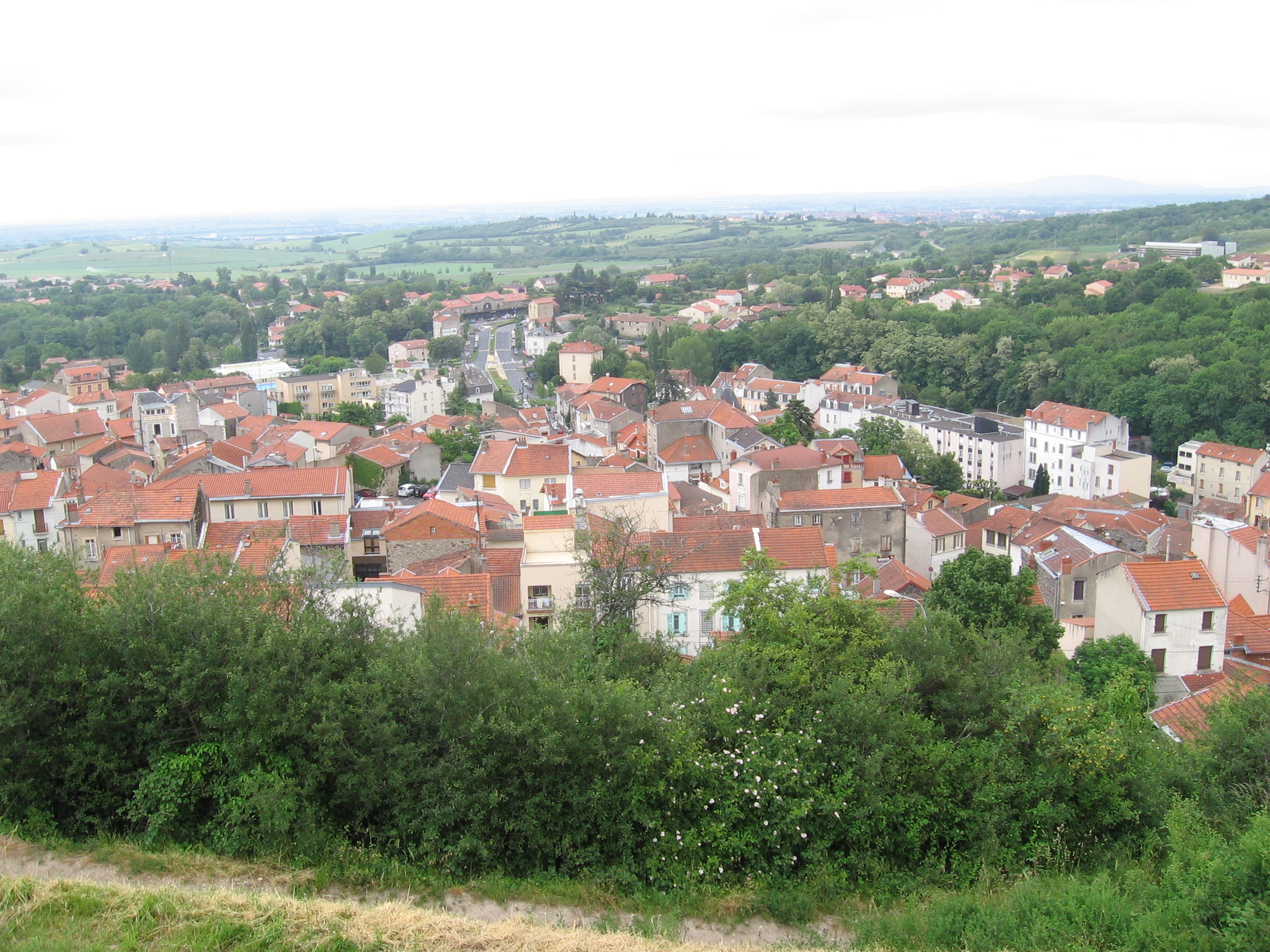 Photo prise le 30 mai 2006